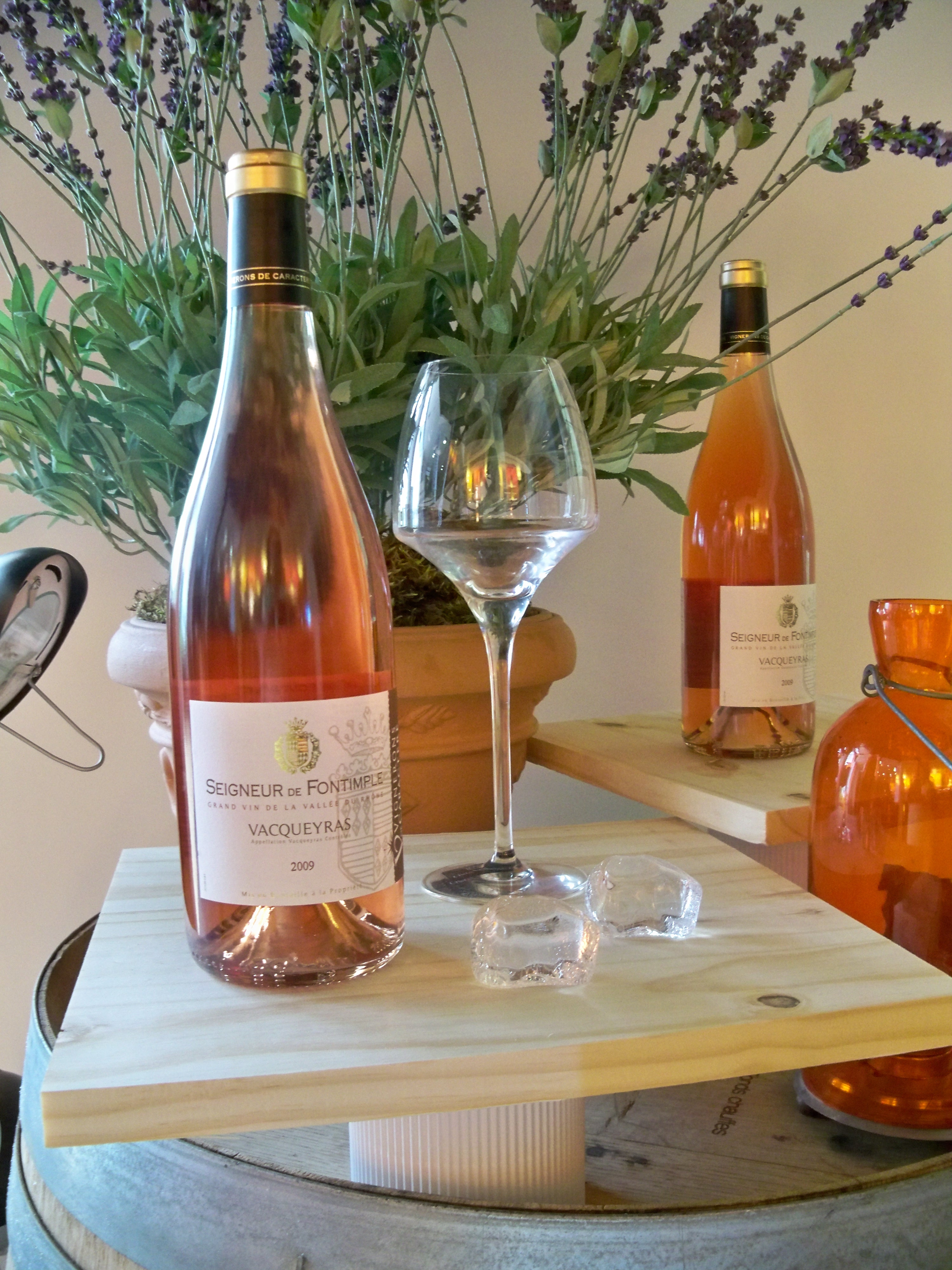 AOC Vacqueyras Rosé